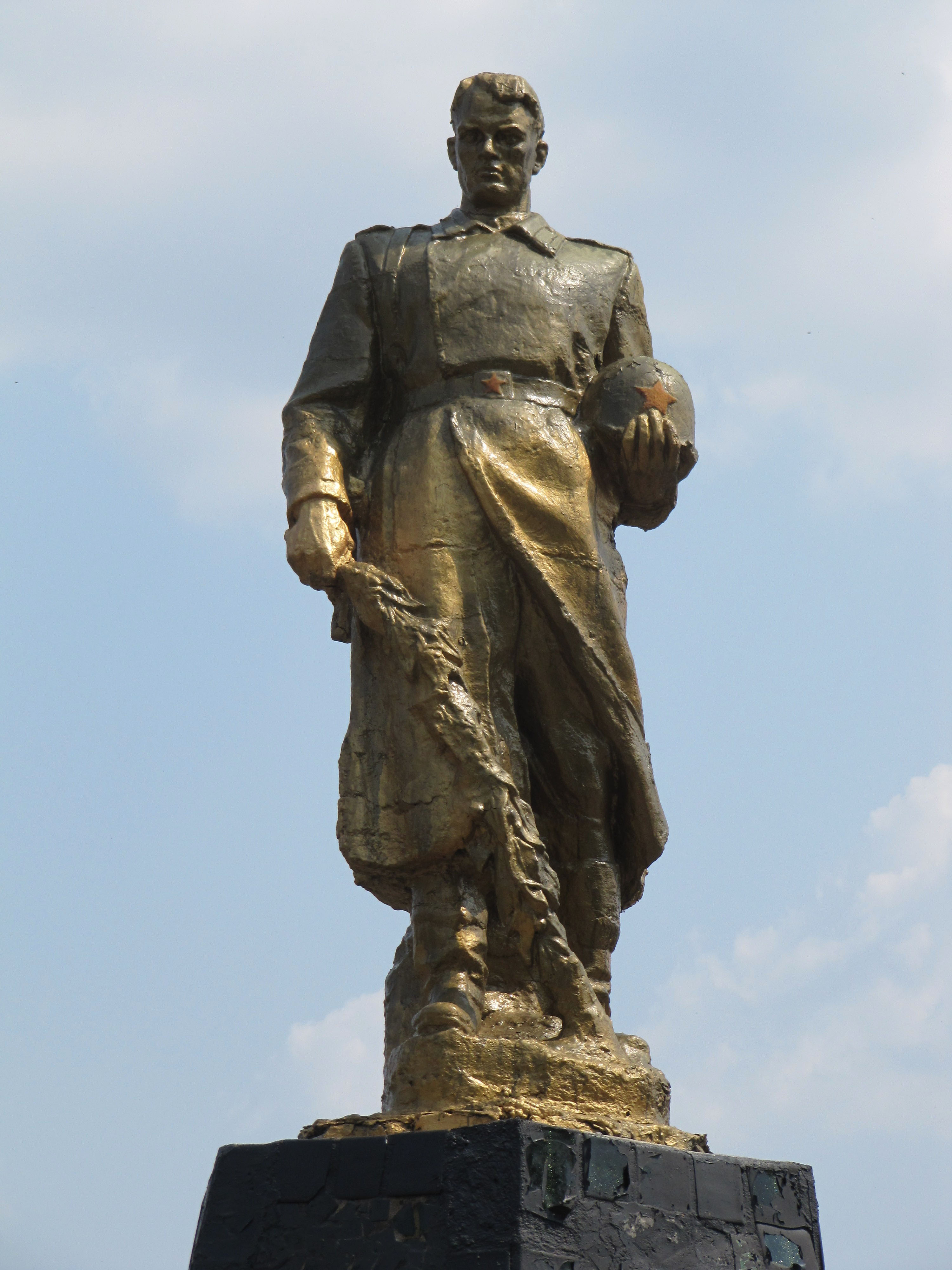 Вознесенський район, село Щербані, Палац Культури Миколаївська весна у Вікіпедії